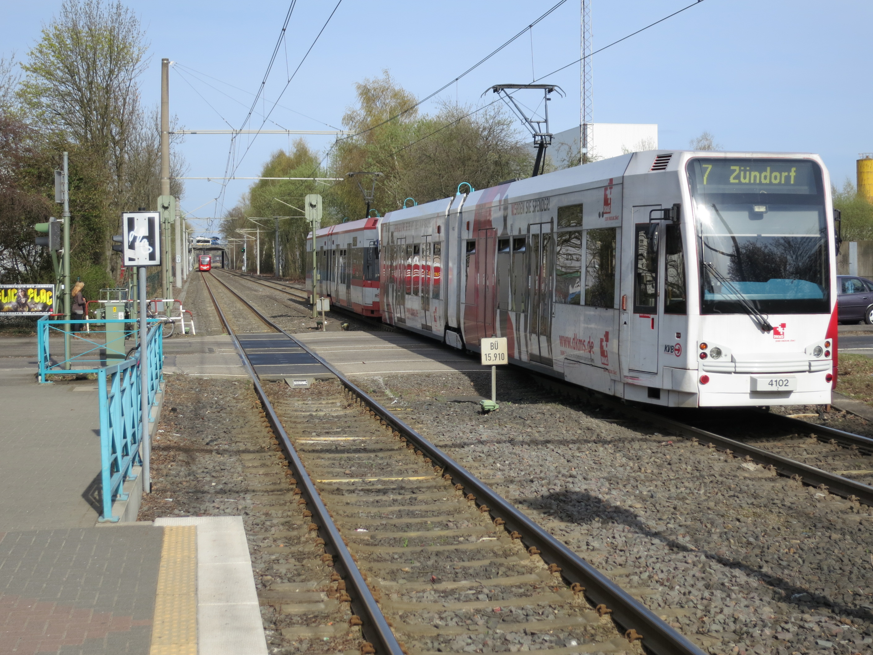 Linie 7 der Kölner Stadtbahn am Bahnhof Marsdorf